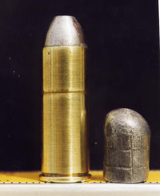 Proyectil de punta hueca